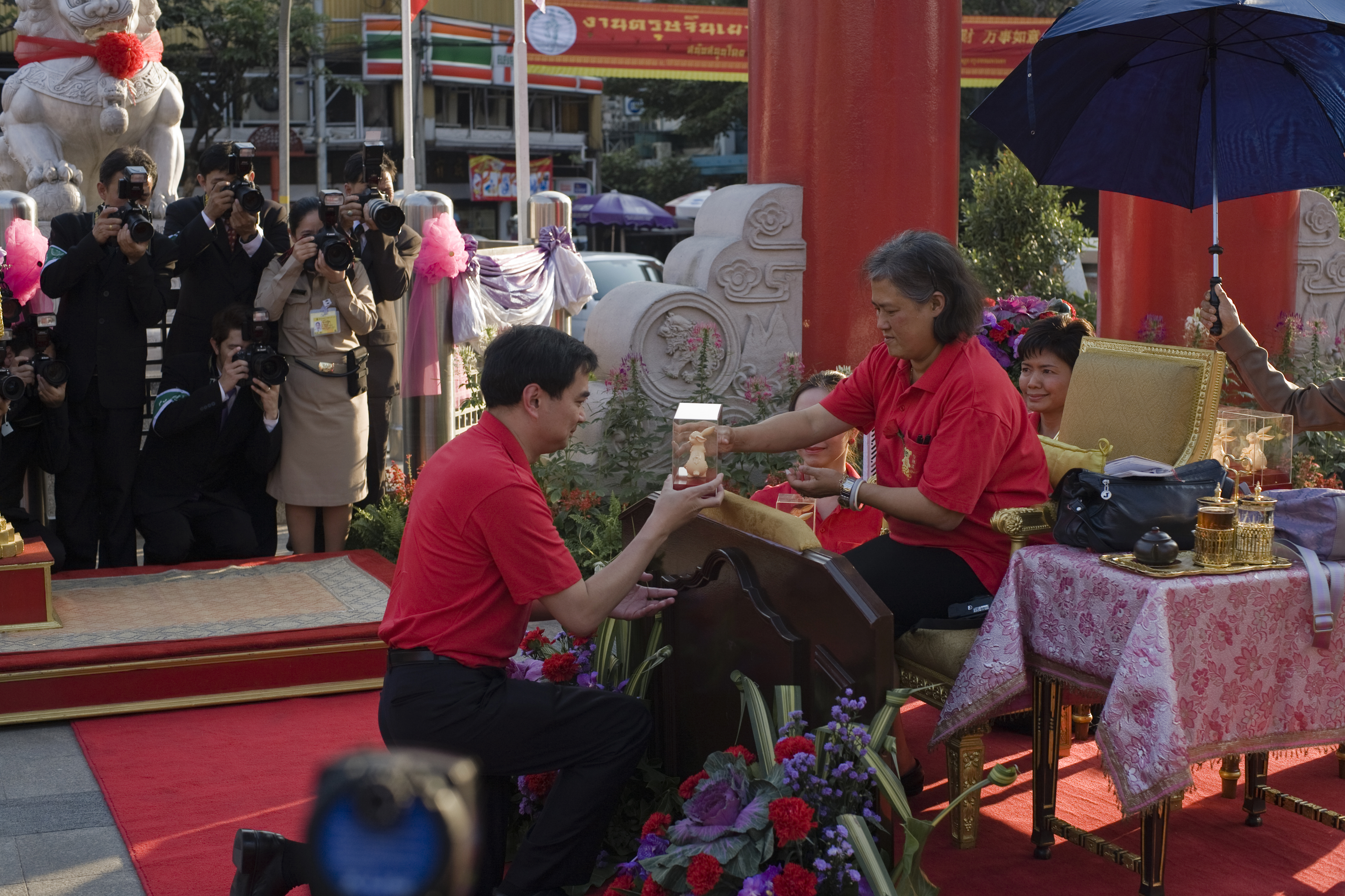 นายกรัฐมนตรีเข้าเฝ้าฯ รับเสด็จฯ สมเด็จพระเทพรัตนราชสุดาฯ สยามบรมราชกุมารี และรับพระราชทานของที่ระลึก ณ ซุ้มประตูเฉลิมพระเกียรติ 6 รอบพระชนมพรรษา ถ.เยาวราช วันพฤหัสบดี ที่ 3 กุมภาพันธ์ พ.ศ.2554 (Photographer attached to the Prime Minister of the Kingdom of Thailand (H.E.Mr.Abhisit Vejjajiva) : Peerapat Wimolrungkarat / พีรพัฒน์ วิมลรังครัตน์) @is50mm